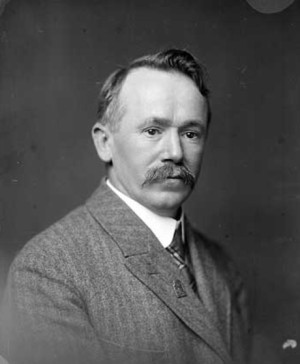 Vojta Beneš (1878 - 1951), Československý politik.